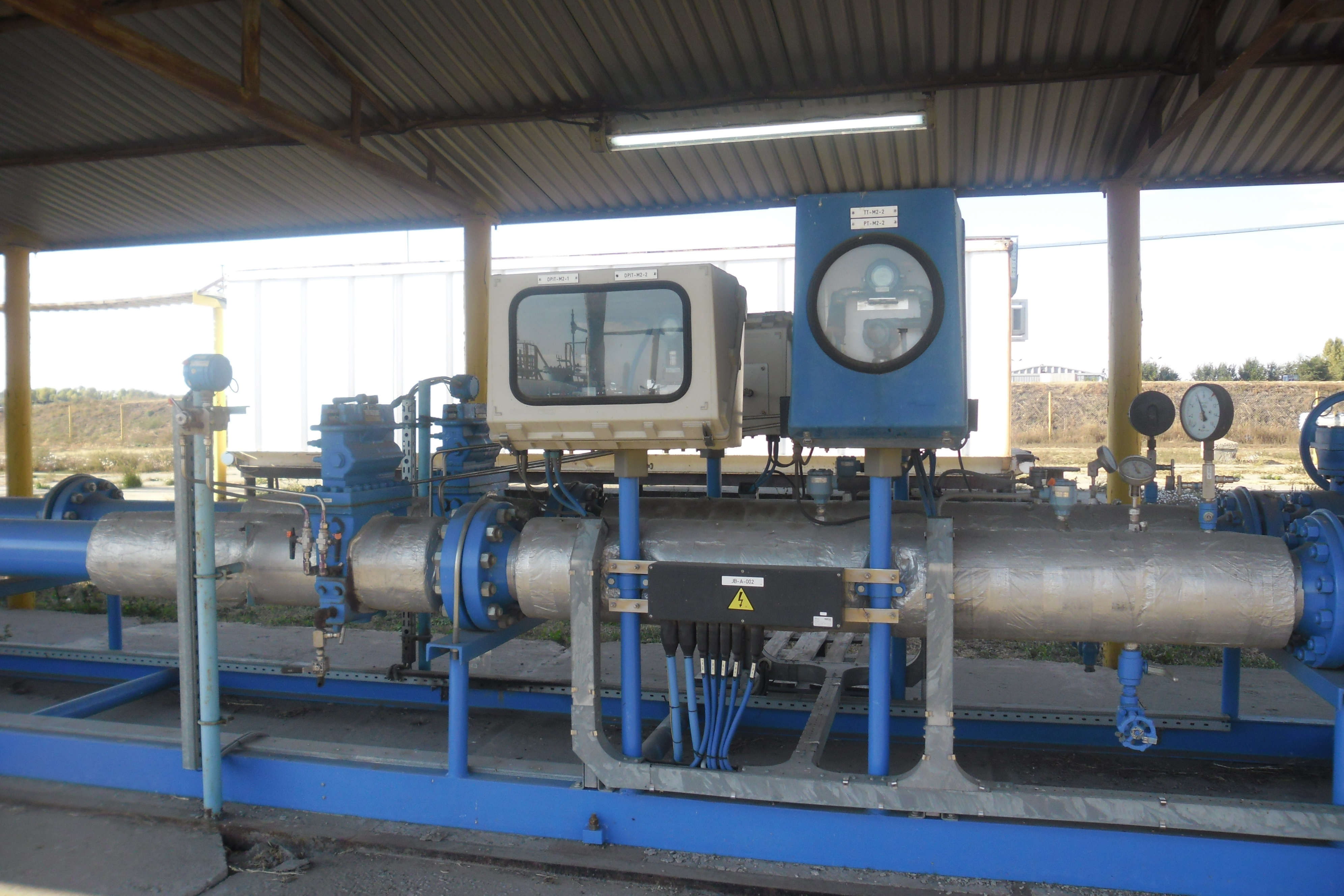 Фото